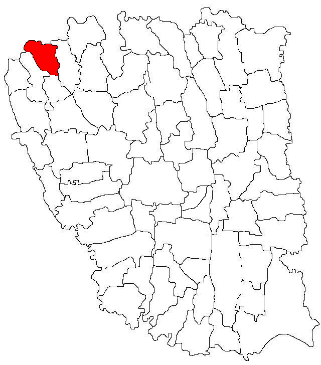 Categorie:Hărţi ale judeţului Galaţi